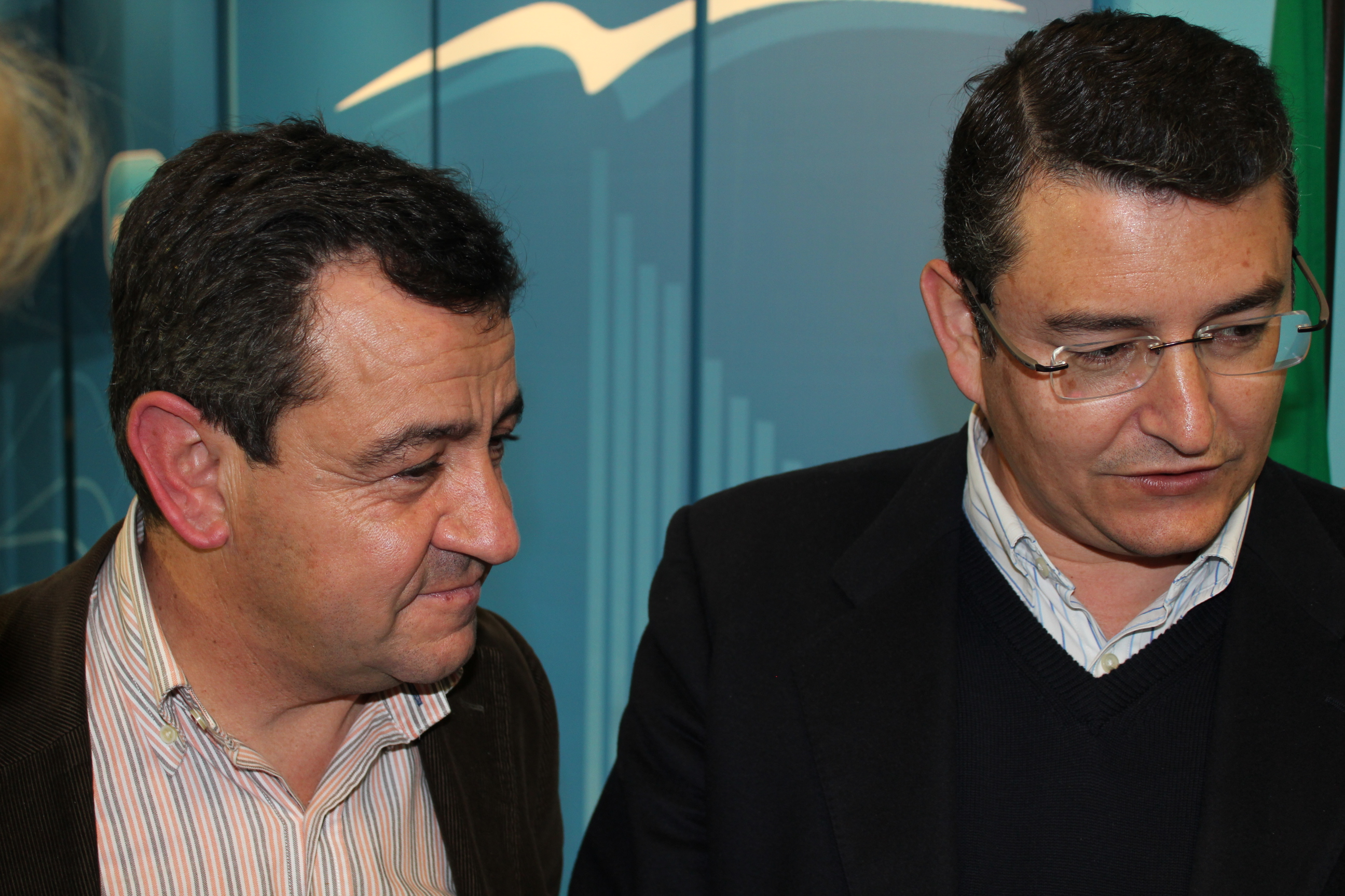 Antonio Sanz (derecha) con José Loaiza (izquierda)